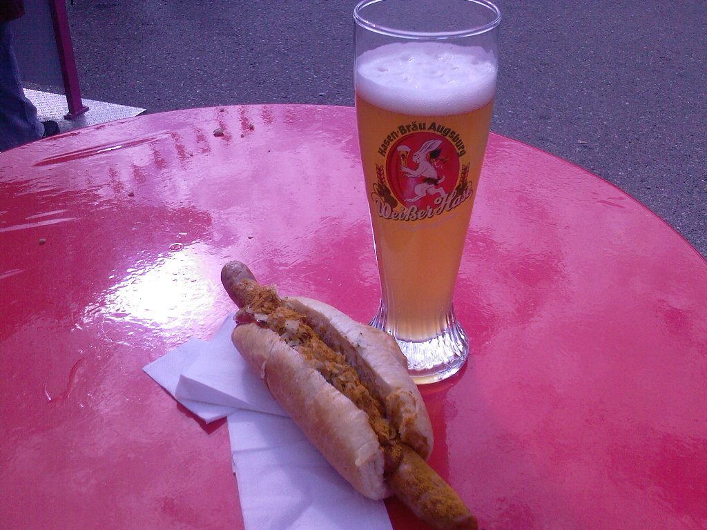 Augsburger Bosna, Plärrer